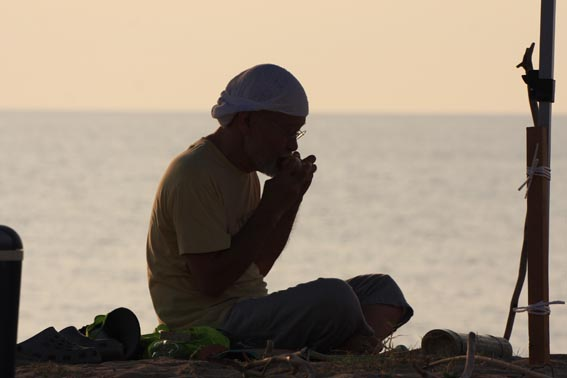 日没のサウンドパフォーマンス